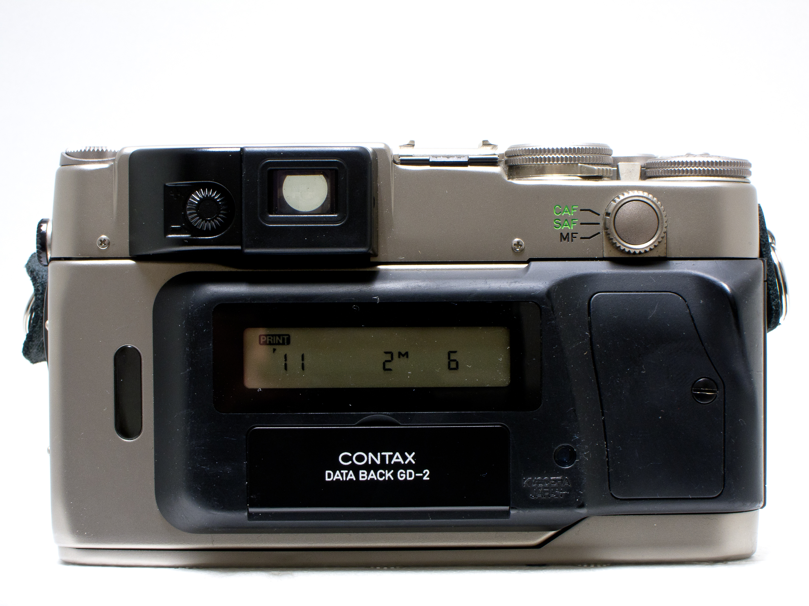 Contax G2D